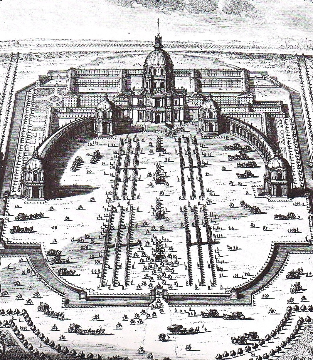 L'église Saint-Louis des Invalides avec sa colonnade (projet de Jules Hardouin-Mansart vers 1700).